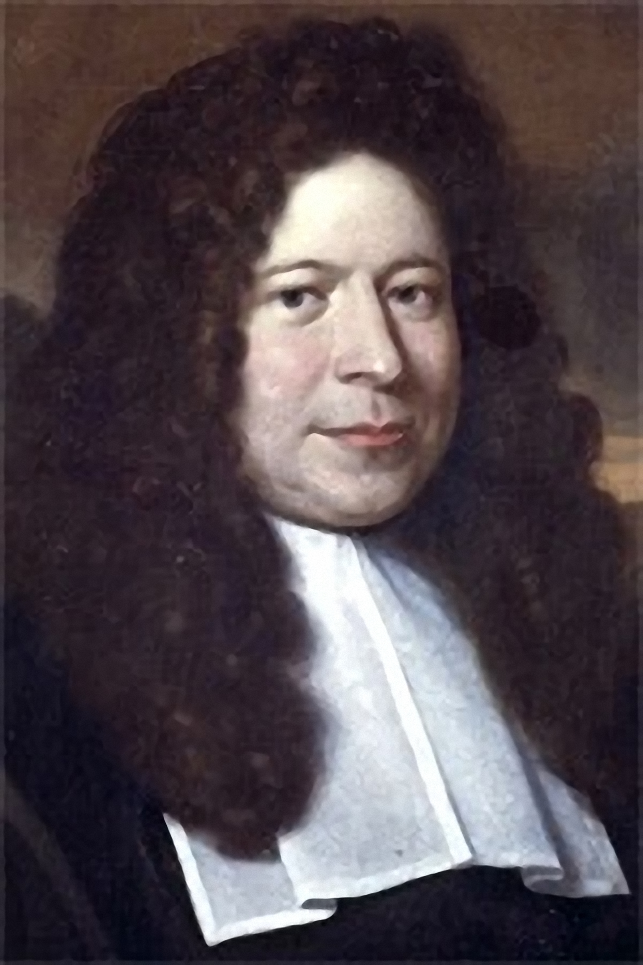 Johannes Voet, niederländischer Jurist